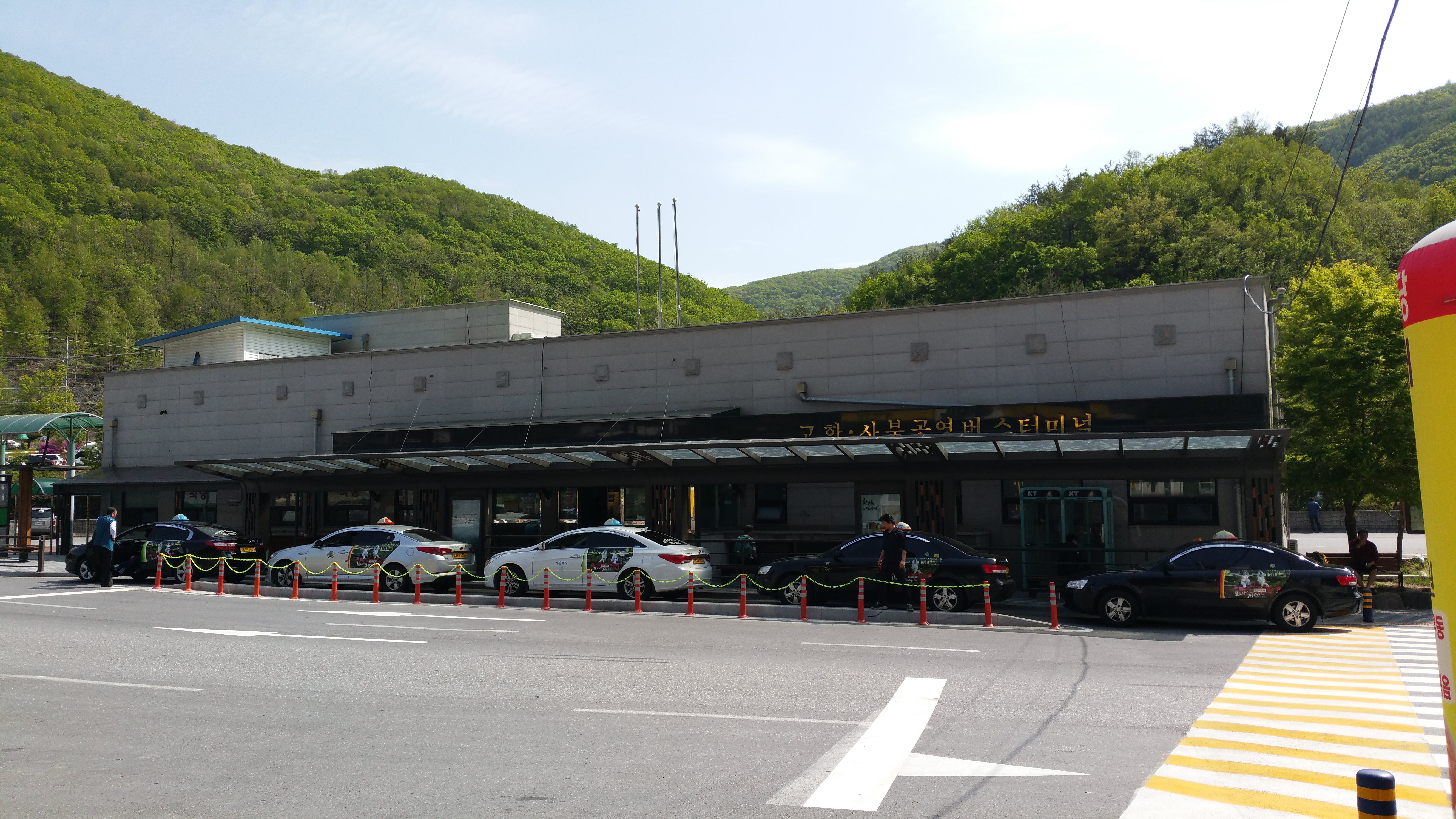 2016년 5월 9일에 촬영된 고한사북공영버스터미널 모습.